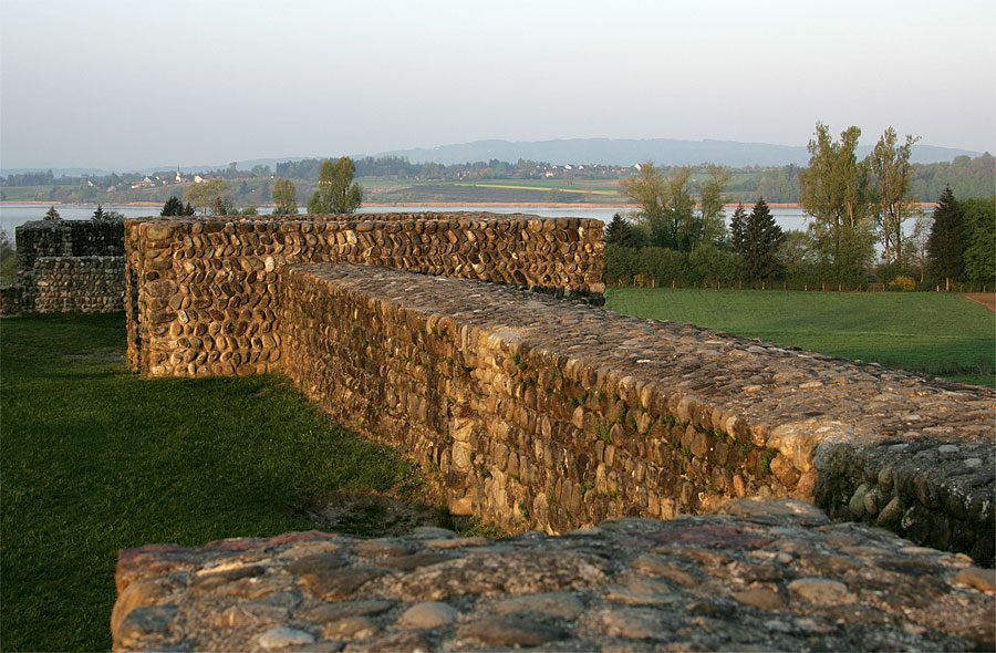 Römisches Kastell in Irgenhausen (Pfäffikon ZH)